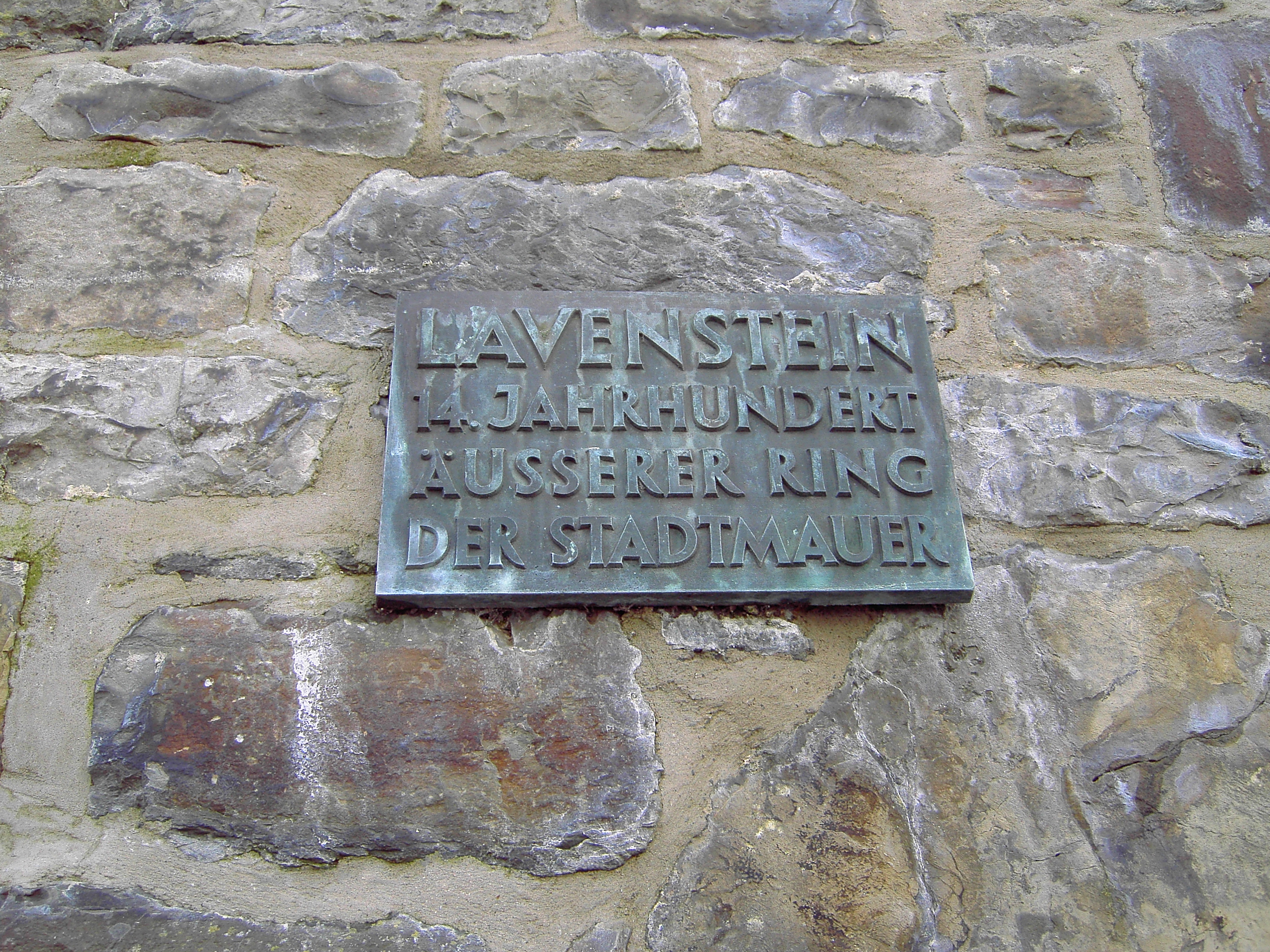 Hinweistafel am Turm der Stadtmauer lavenstein